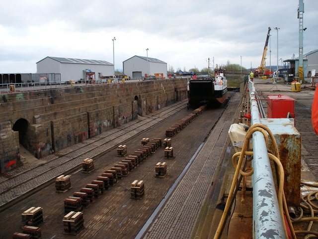 Graving dock